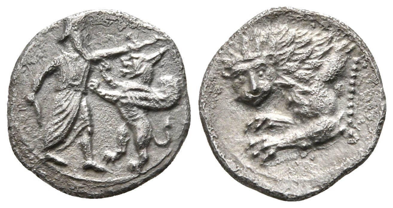 سکه هخامنشی ضرب کلیکیا با تصویر تقابل شهریار (اردشیر سوم) و شیر 340 قبل از میلاد